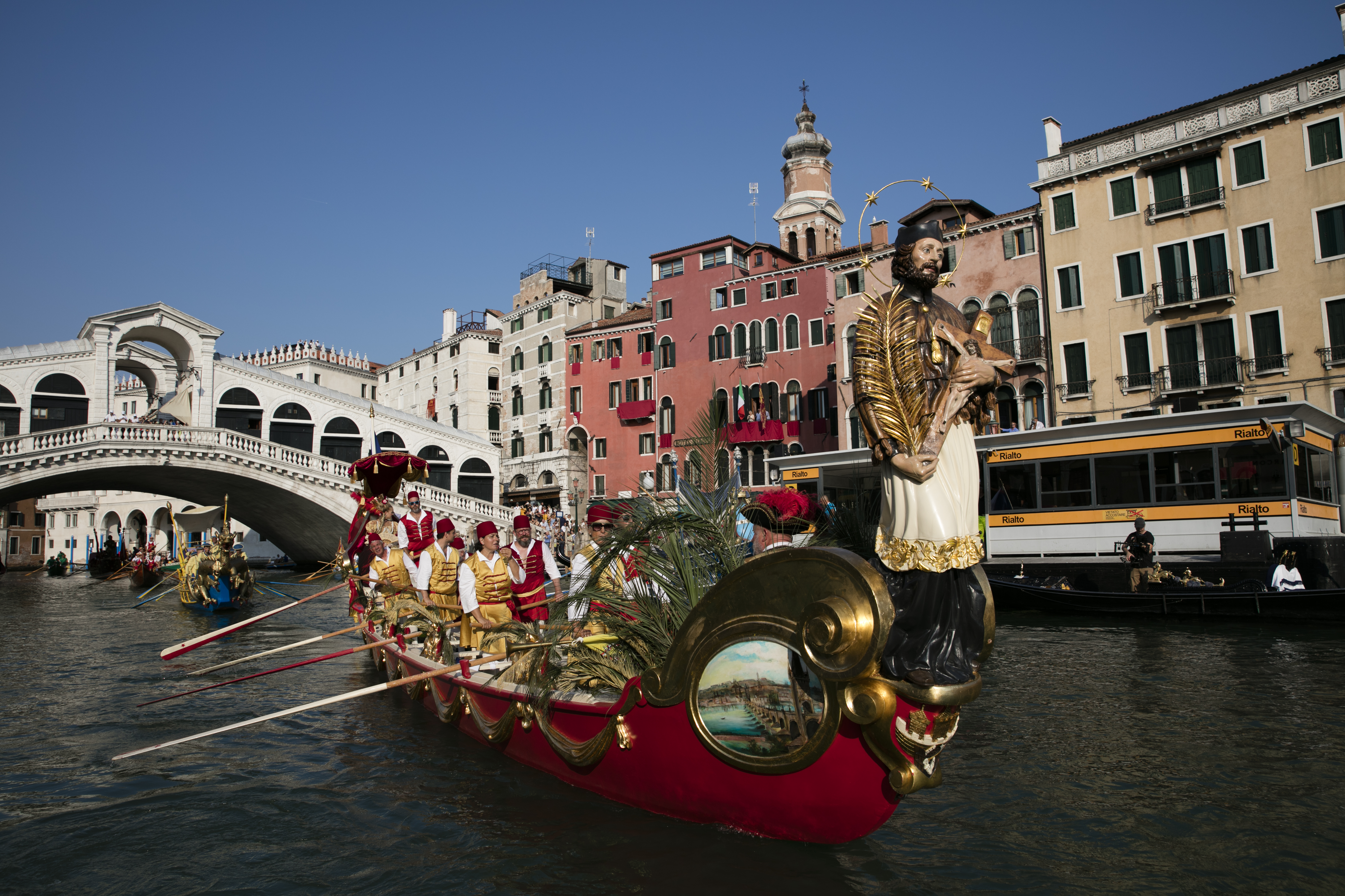 Regata Storica 2019